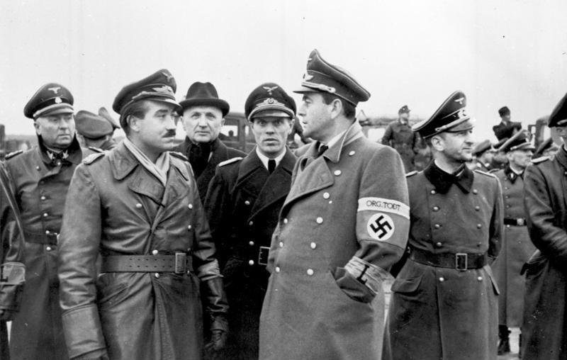 Zentralbild II. Weltkrieg 1939 - 1945 Rüstungstagung in Rechlin am Müritzsee vom 5.-7. September 1943 UBz: die Tagungsteilnehmer auf dem Versuchsgelände. vorn links: Generalmajor der Flieger Adolf Galland; rechts: der Reichminister für Rüstung und Kriegsproduktion Prof. Albert Speer.